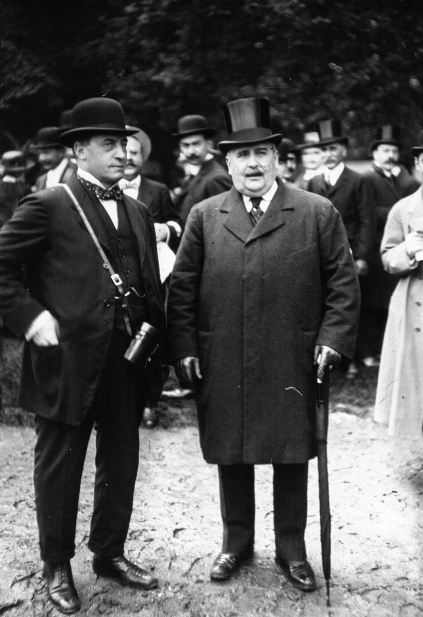 James Hennessy, propriétaire de "Lord Loriss", gagnant du Grand Steeple